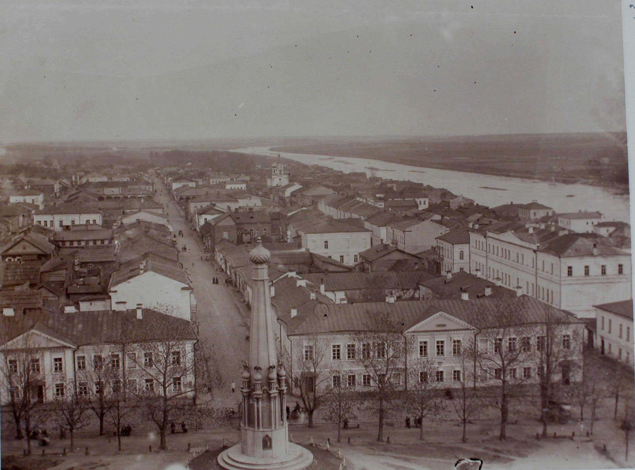 Полацк. Забудова ўсходняга боку плошчы з Мікалаеўскага сабора. 1889-1891 гг. (БДАКФФД)Беларуская (тарашкевіца): Полацак (Połacak), вуліца Віцебская (vulica Viciebskaja) ад пляцу Рынку (plac Rynak)